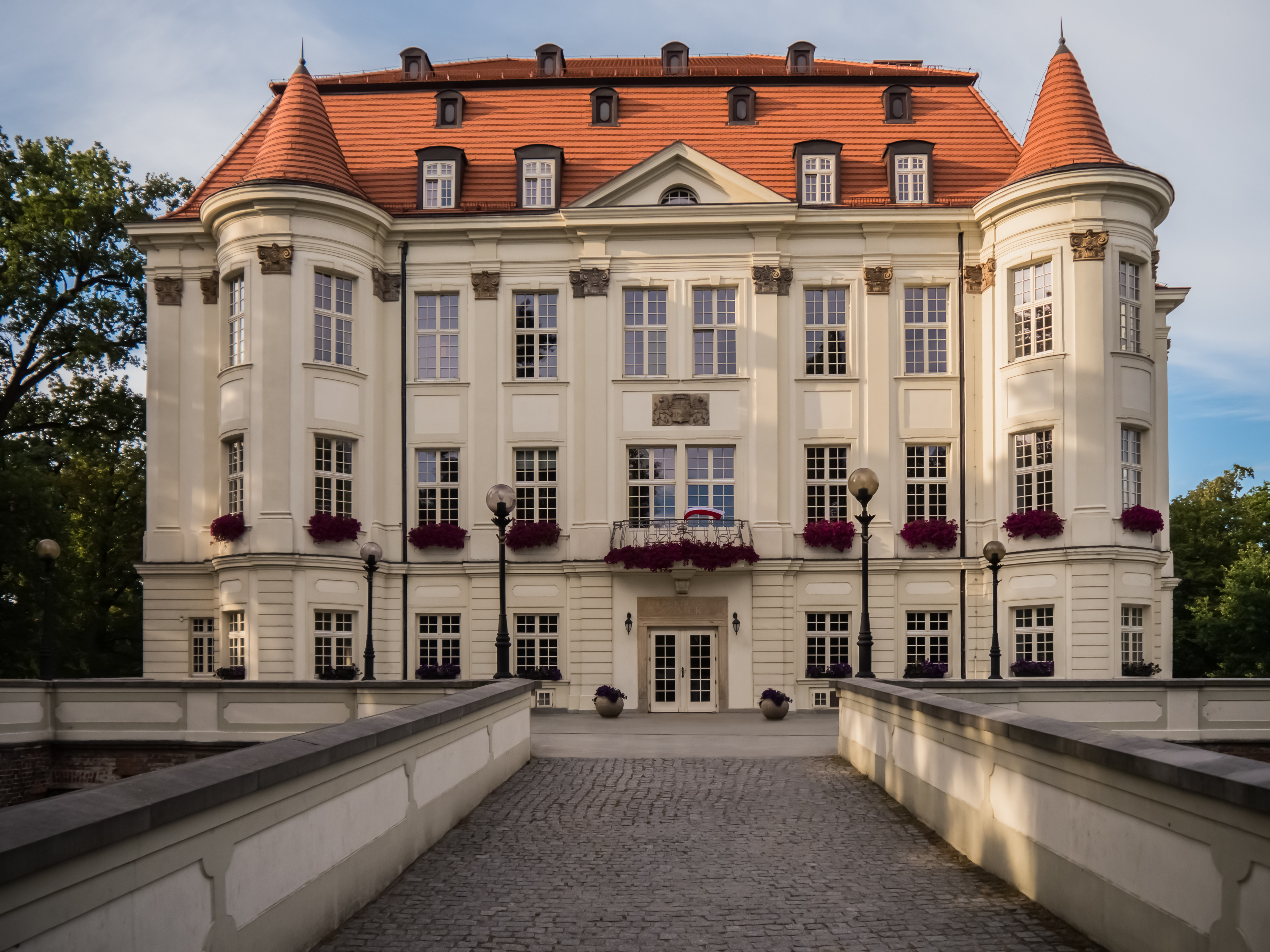 Wrocław, Zamek w Leśnicy Wikidata has entry Q16619009 with data related to this item.